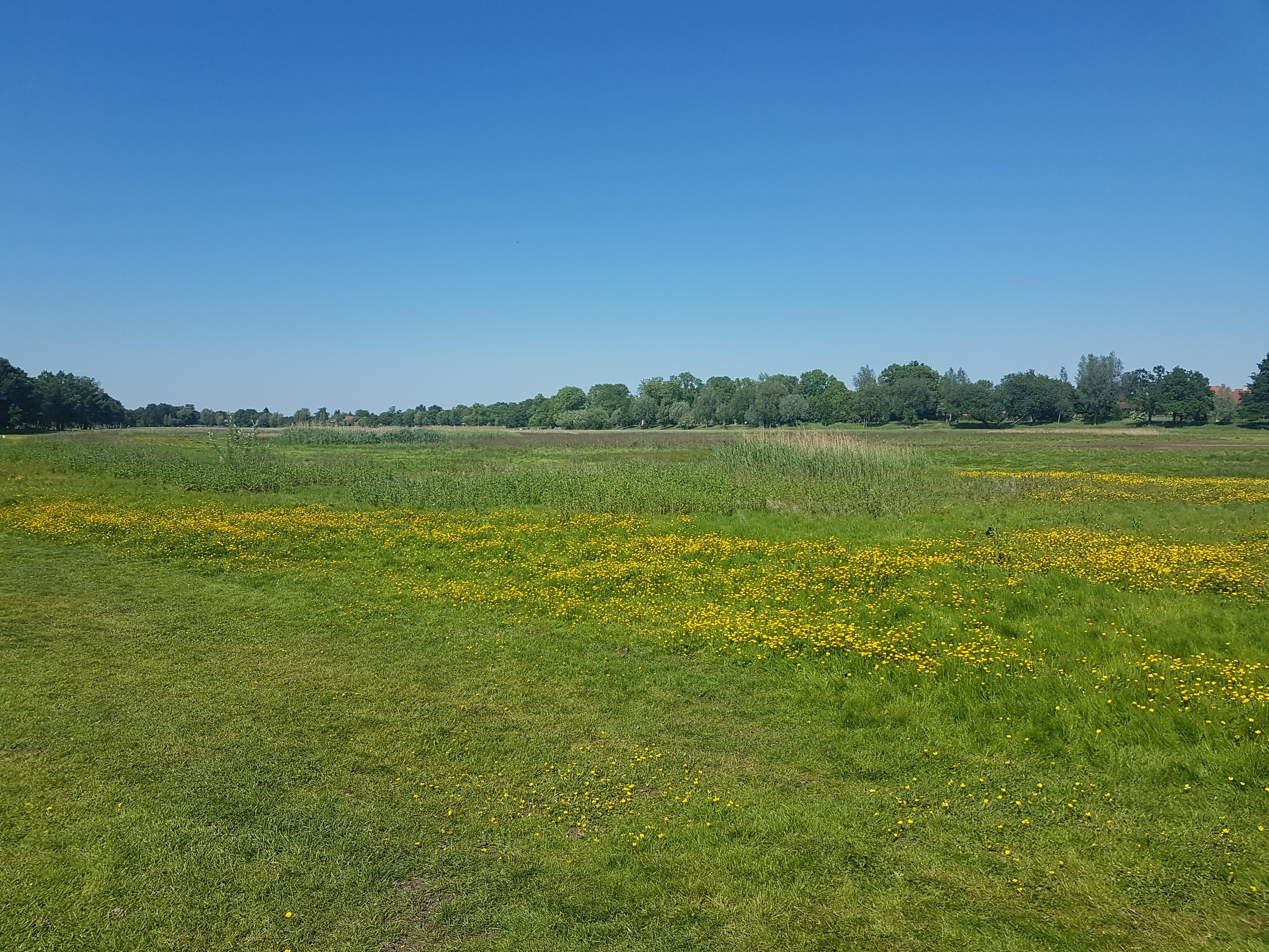 damhusengen 2018